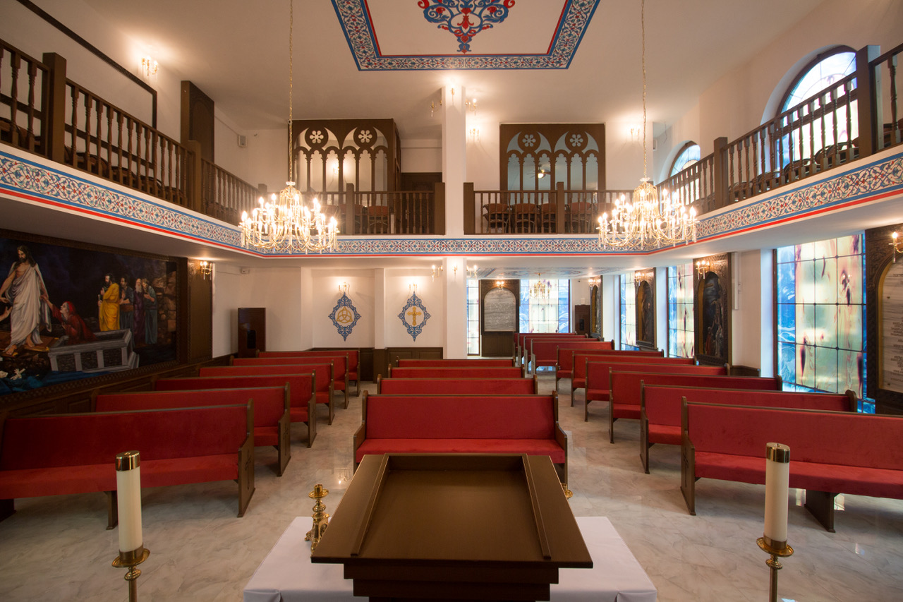 Samsun Protestan Kilisesi - Yeni Bina İçinde